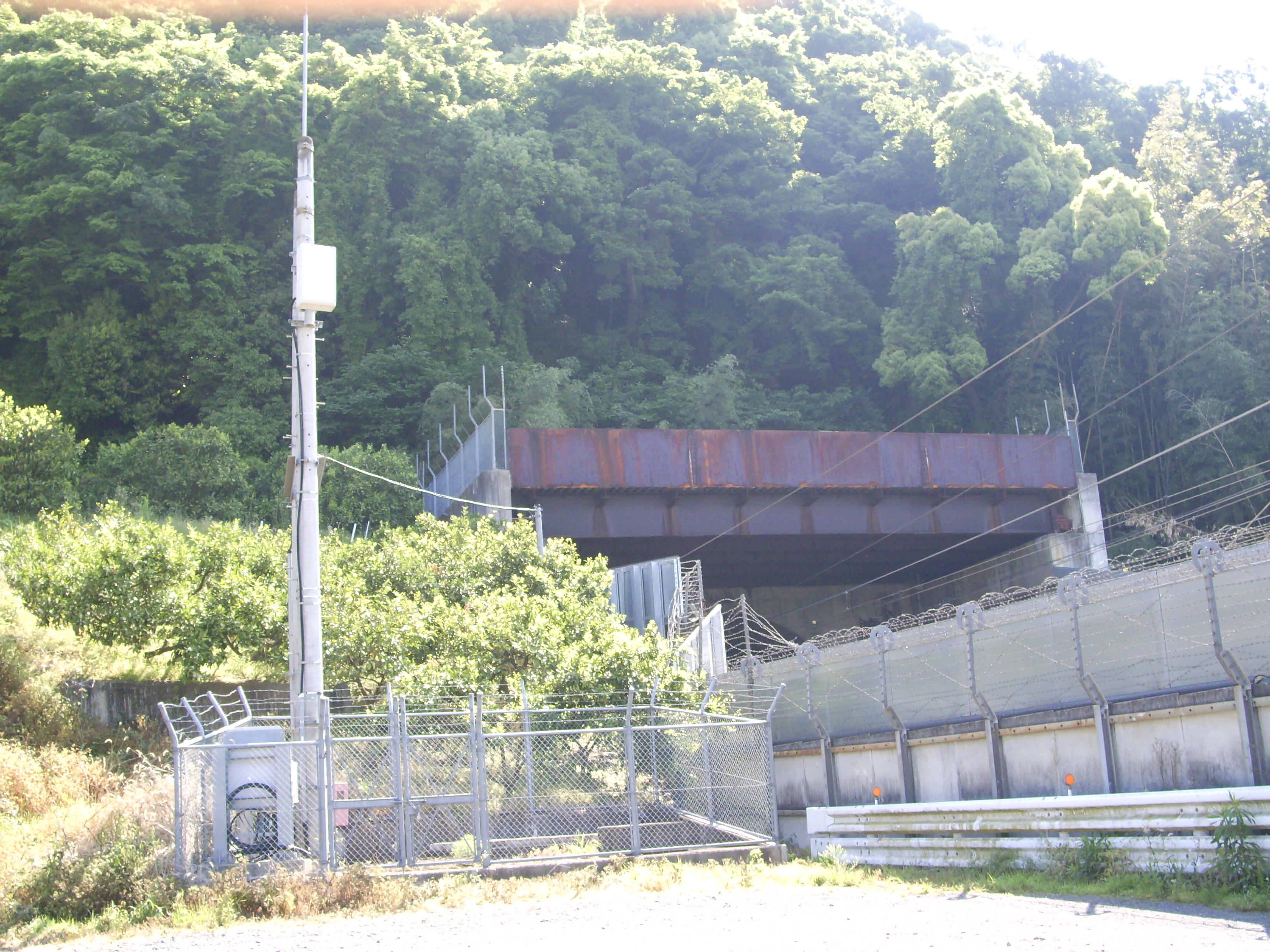 東海道新幹線鴨宮モデル線区間では最長となる弁天山トンネル内で列車電話の通話ができるように設置された中継機アンテナ、トンネル内の形漏洩導波ケーブルと繋がっている ㊟カメラを起動すると日付機能が出荷時のものに初期化されるため、ファイル履歴の撮影・投稿日時とメタデータの原画像データの生成日時が異なります